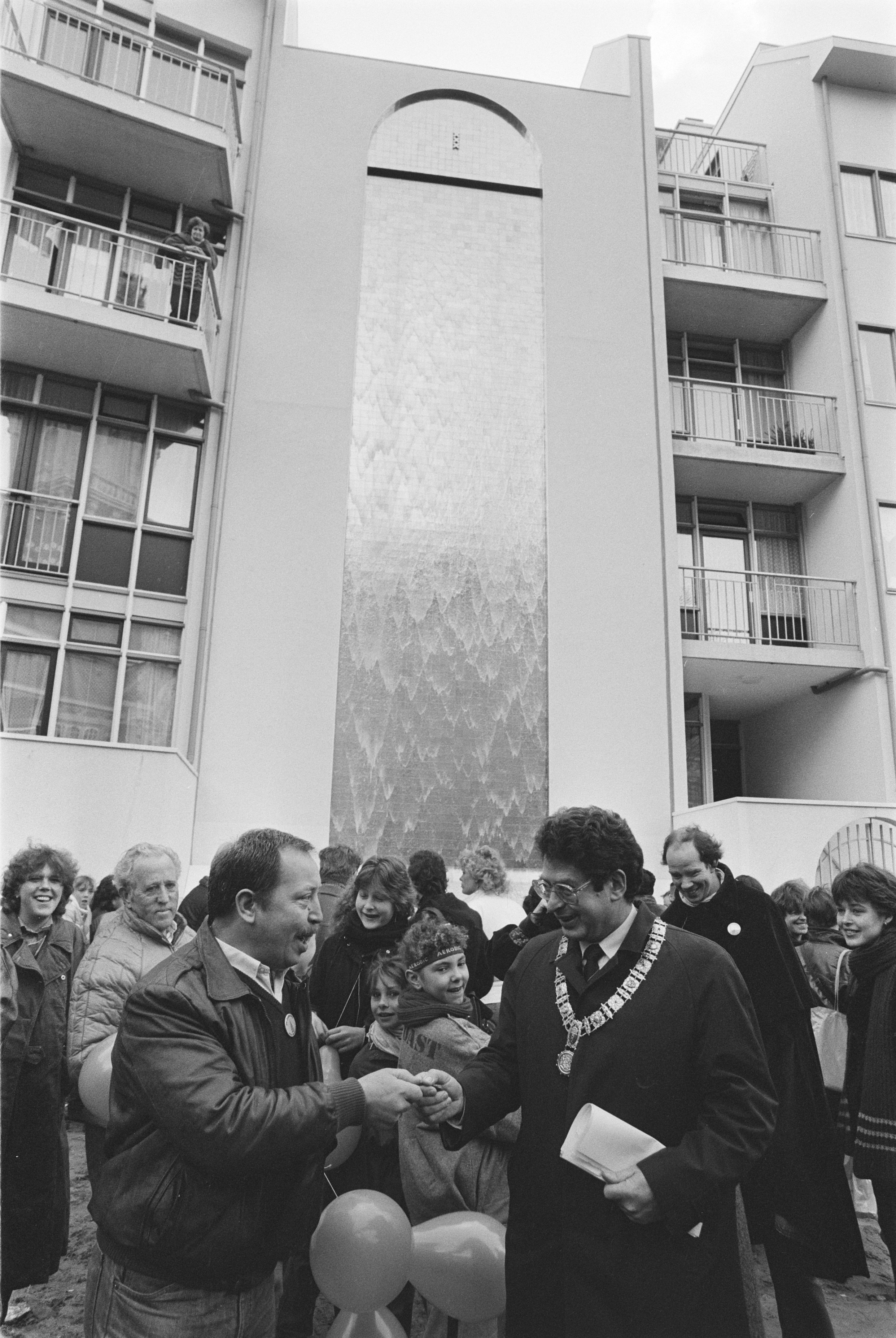 Collectie / Archief : Fotocollectie Anefo Reportage / Serie : [ onbekend ] Beschrijving : Amsterdam, Nieuwmarktbuurt; "waterval" in werking gesteld Zuiderkerkhof Datum : 28 maart 1984 Locatie : Amsterdam, Noord-Holland Fotograaf : Antonisse, Marcel / Anefo Auteursrechthebbende : Nationaal Archief Materiaalsoort : Negatief (zwart/wit) Nummer archiefinventaris : bekijk toegang 2.24.01.05 Bestanddeelnummer : 932-9149